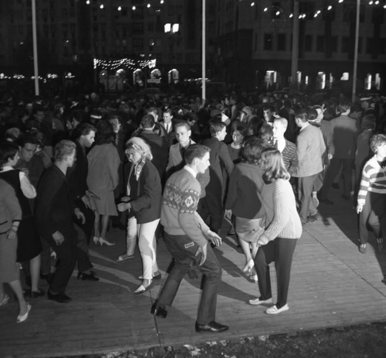 Zentralbild/Hochneder 17.5.1964 Sonderdienst Deutschlandtreffen Tanz am Pfingstsonnabendabend. Eifrig wurde auf den Tanzflächen von der Karl-Marx-Allee bis Unter den Linden getwistet.